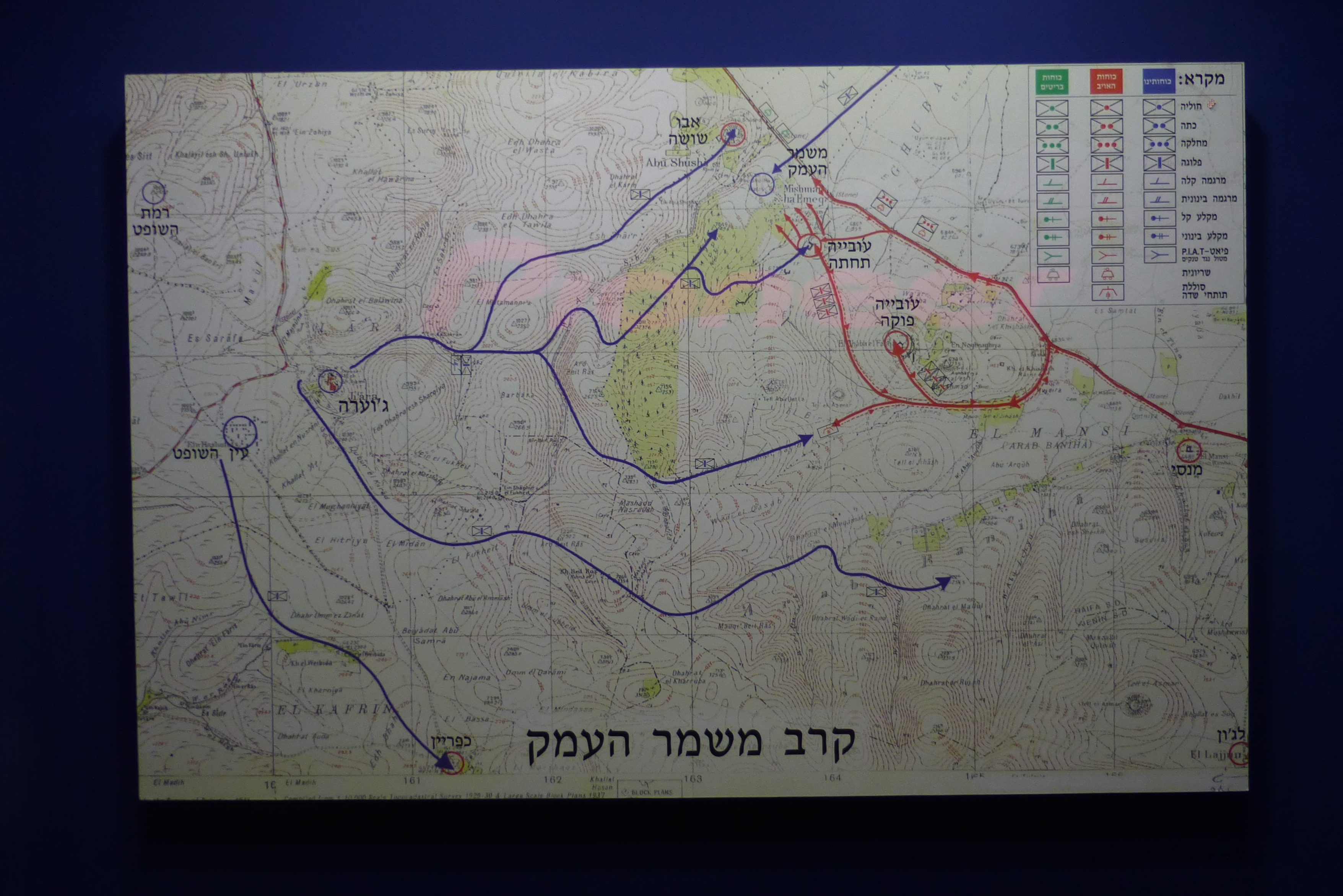 ג'וערה הוא בסיס גדנ"ע ומוזיאון הנמצאים על גבעה ברמות מנשה, במיקום היסטורי ששימש בעבר כבסיס ההדרכה המרכזי למפקדים של ארגון "ההגנה". שמה העברי של הגבעה הוא "גבעת נֹח".